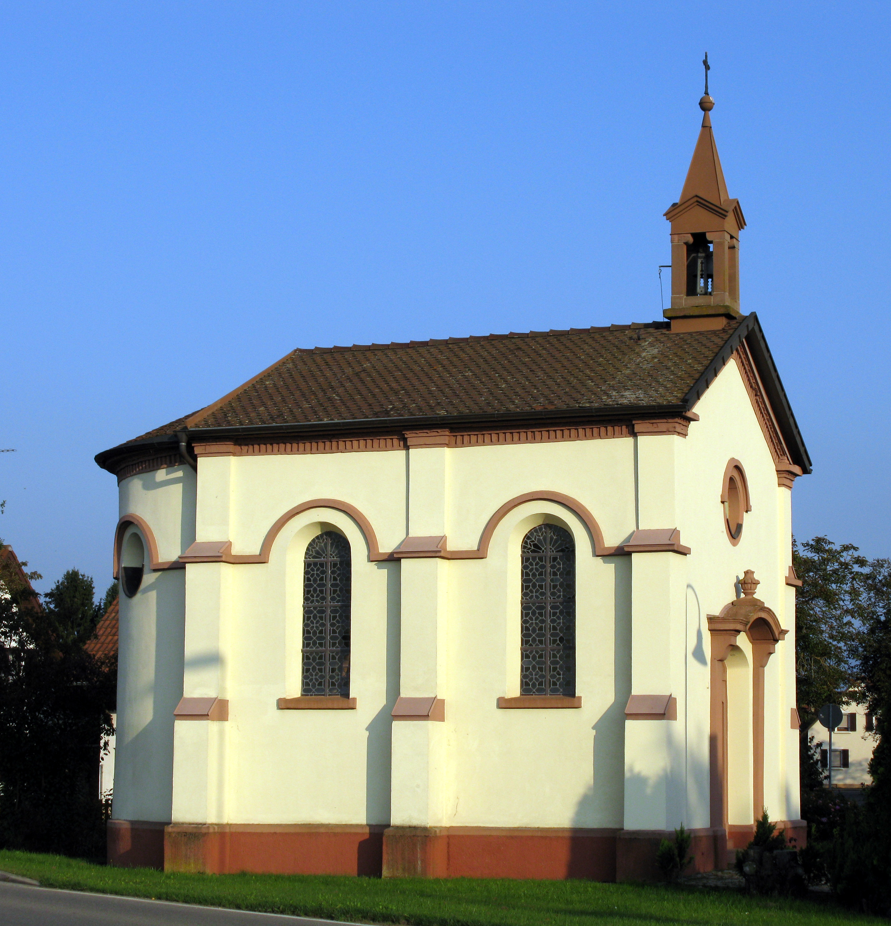 Ottilienkapelle in Hartheim-Feldkirch, erbaut 1863